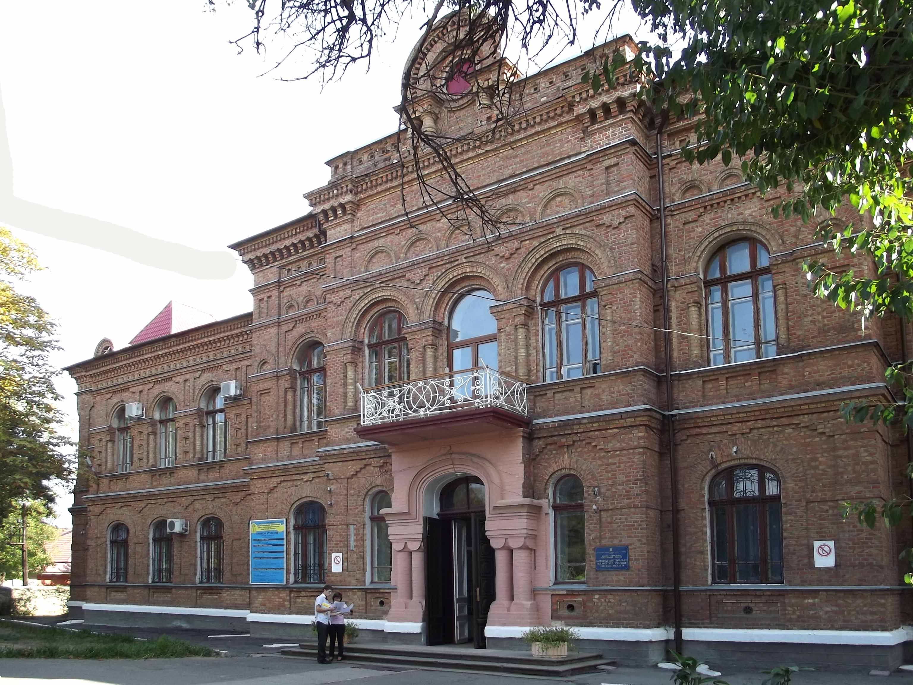 Педагогическое училище